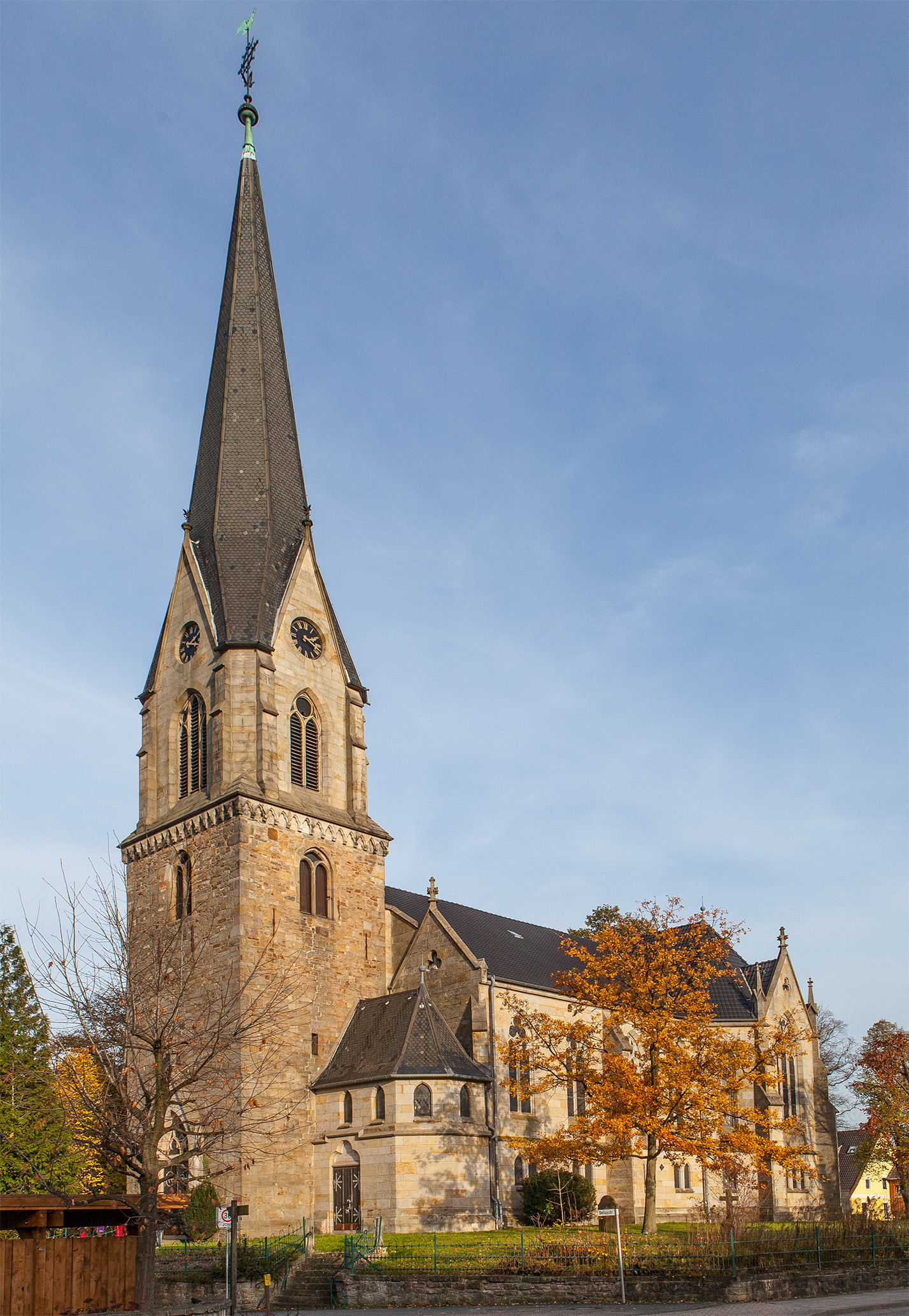 Kleinenbremen, Evangelische Pfarrkirche This is a photograph of an architectural monument.